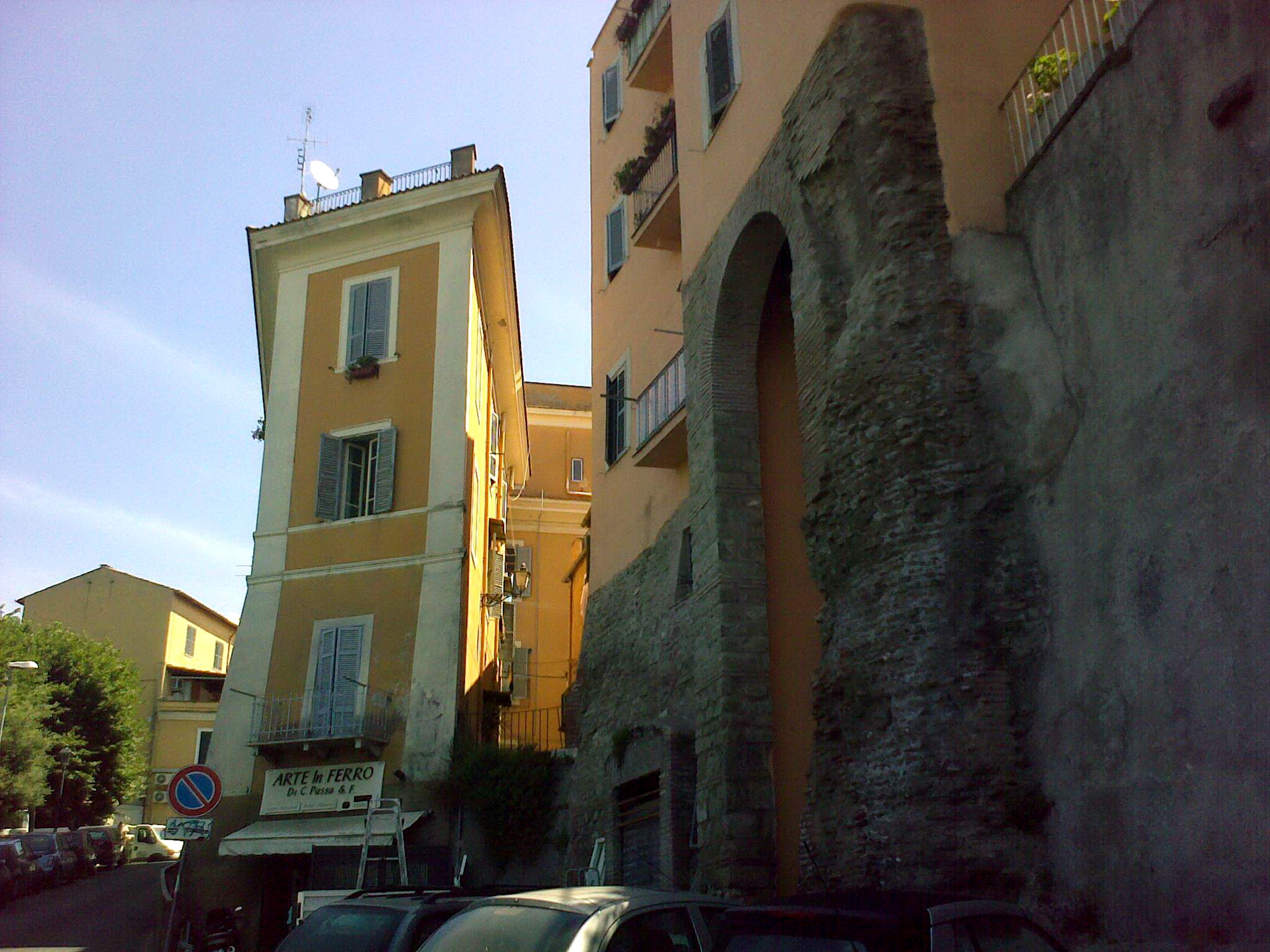 Albano Laiale, le costruzioni integrate nelle antiche terme di Cellomaio